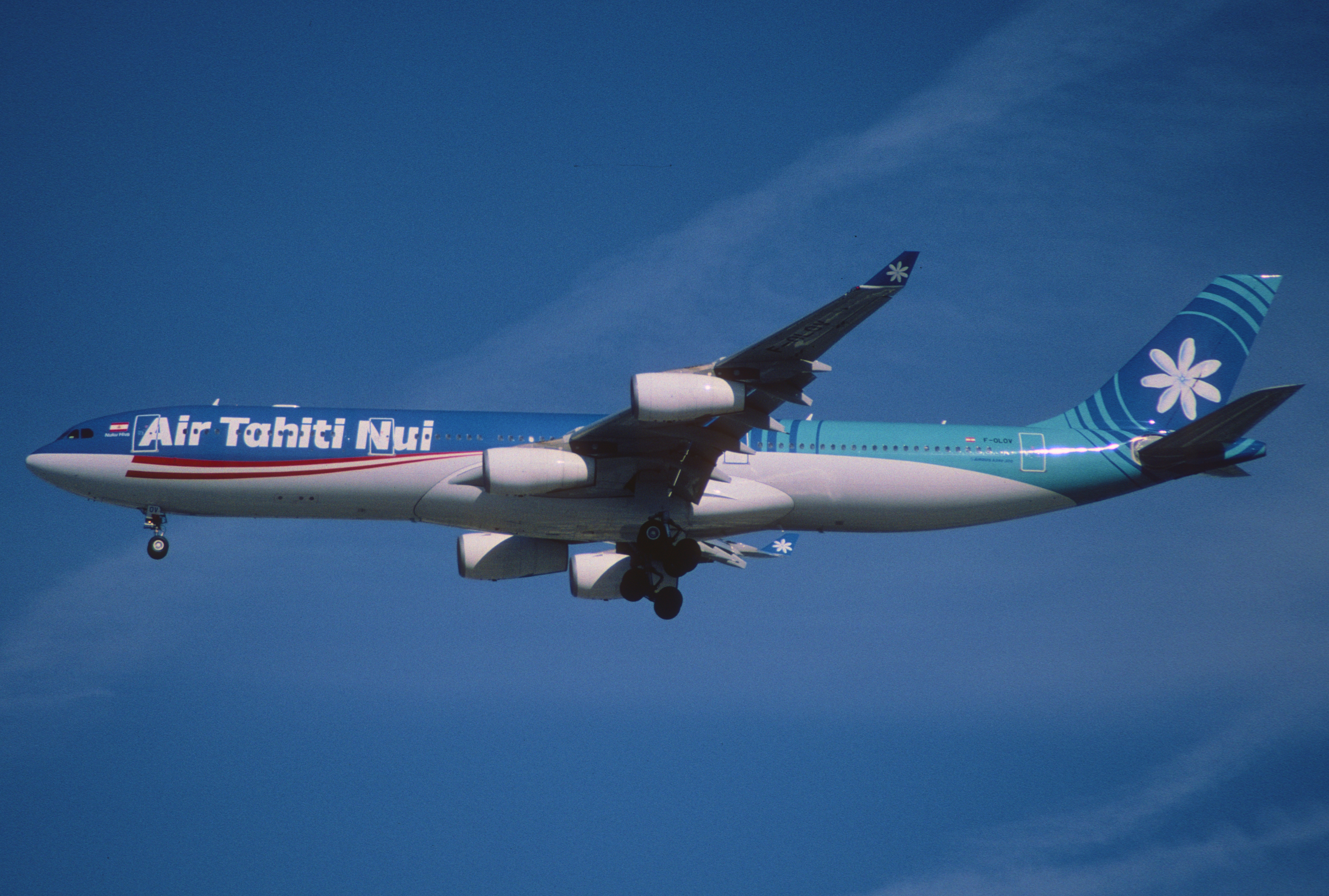 397bb - Air Tahiti Nui Airbus A340-313X; F-OLOV@LAX;13.02.2006